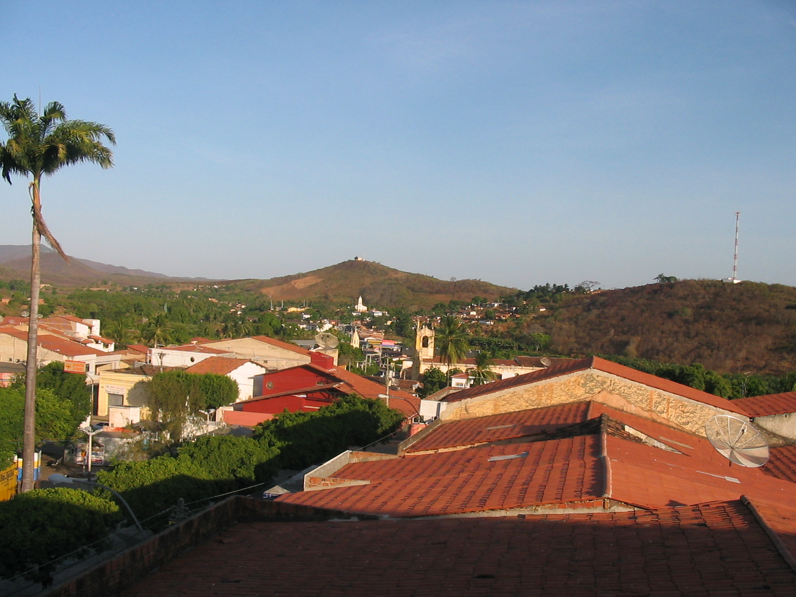 Na foto, época de escasses de chuva na região da Caatinga. Cidade de Baturité/CE. A vegetação seca e marrom toma de conta da paisagem.